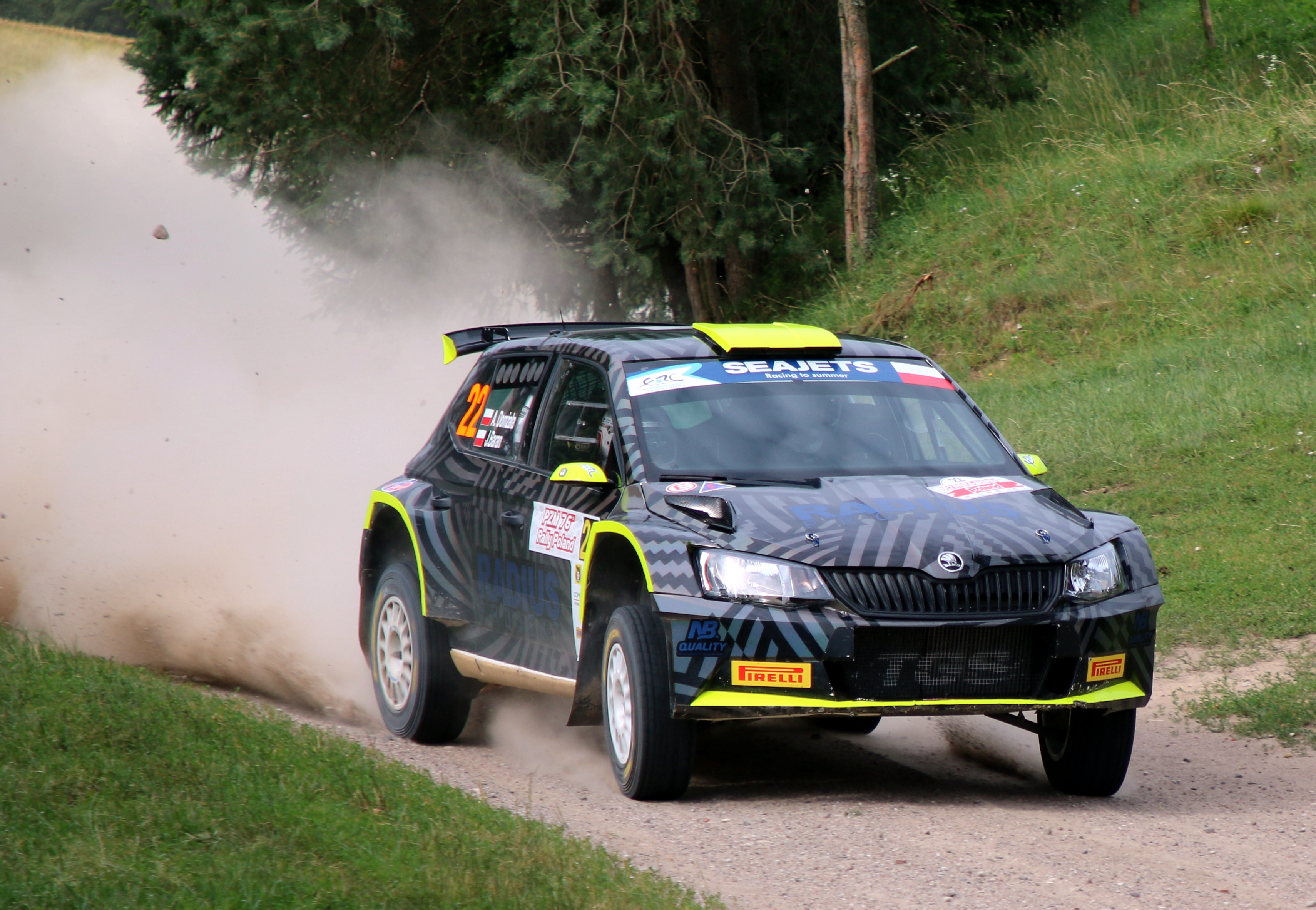 Aron Domżała podczas Rajdu Polski 2019